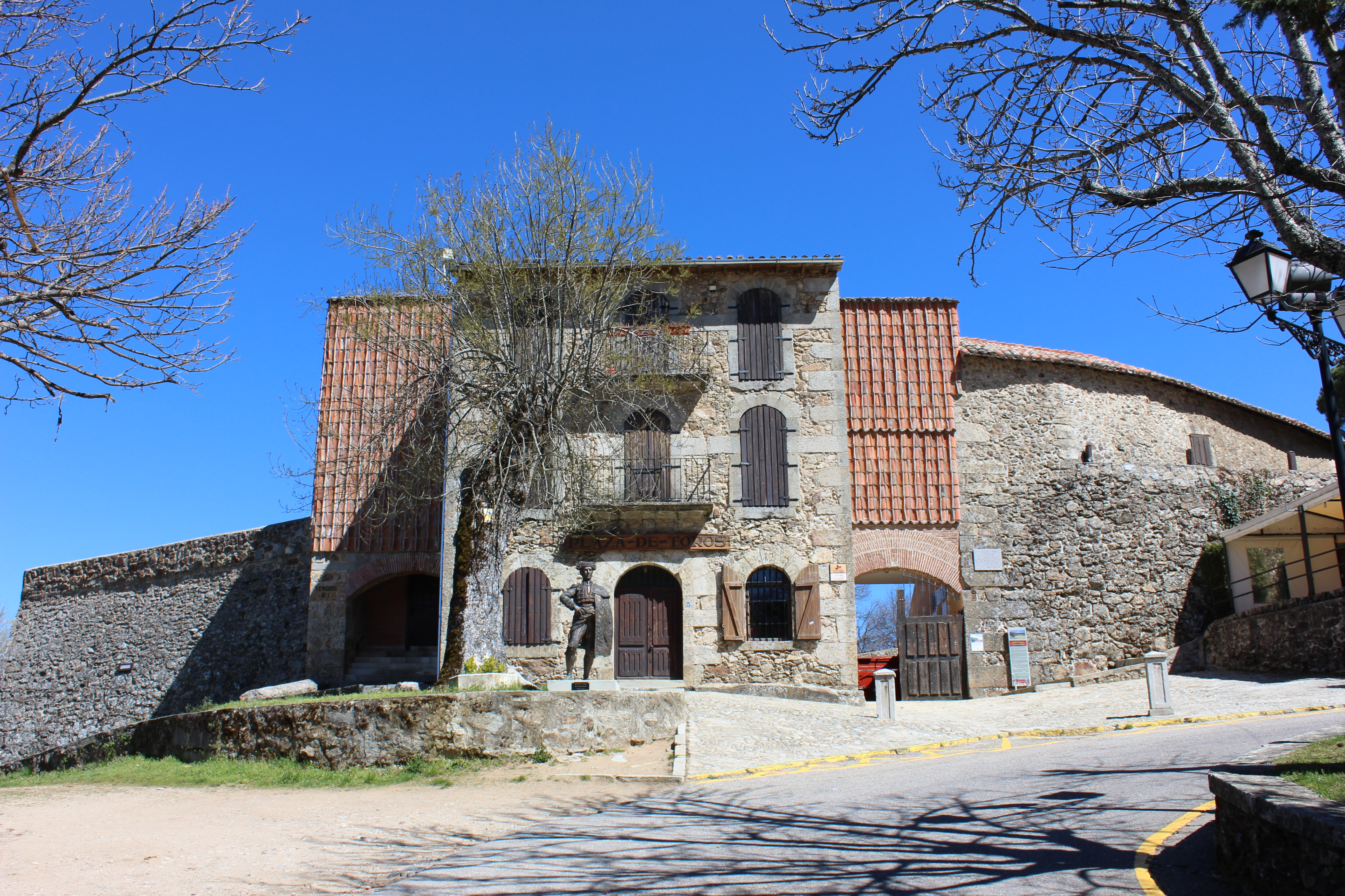 حلبة مصارعة الثيران في بيخار في إسبانيا.